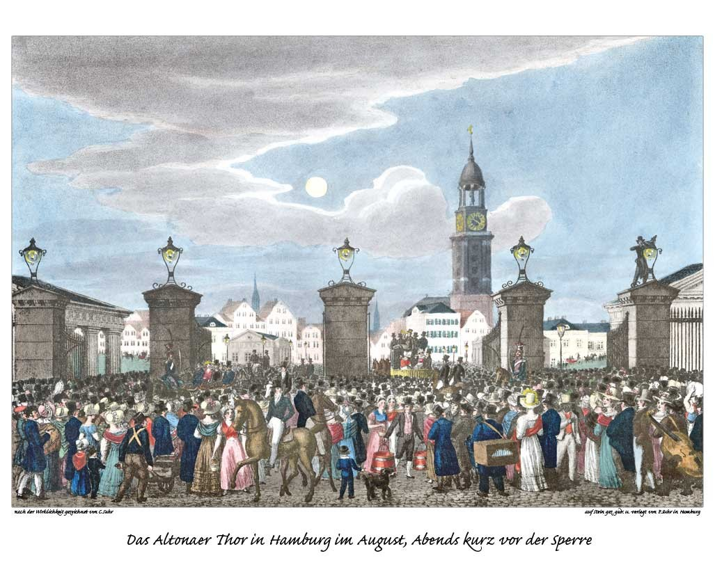 "Das Altonaer Thor in Hamburg im August, Abends kurz vor der Sperre", zu sehen ist die 1819/20 neu erbaute klassizistische Toranlage von Carl Ludwig Wimmel